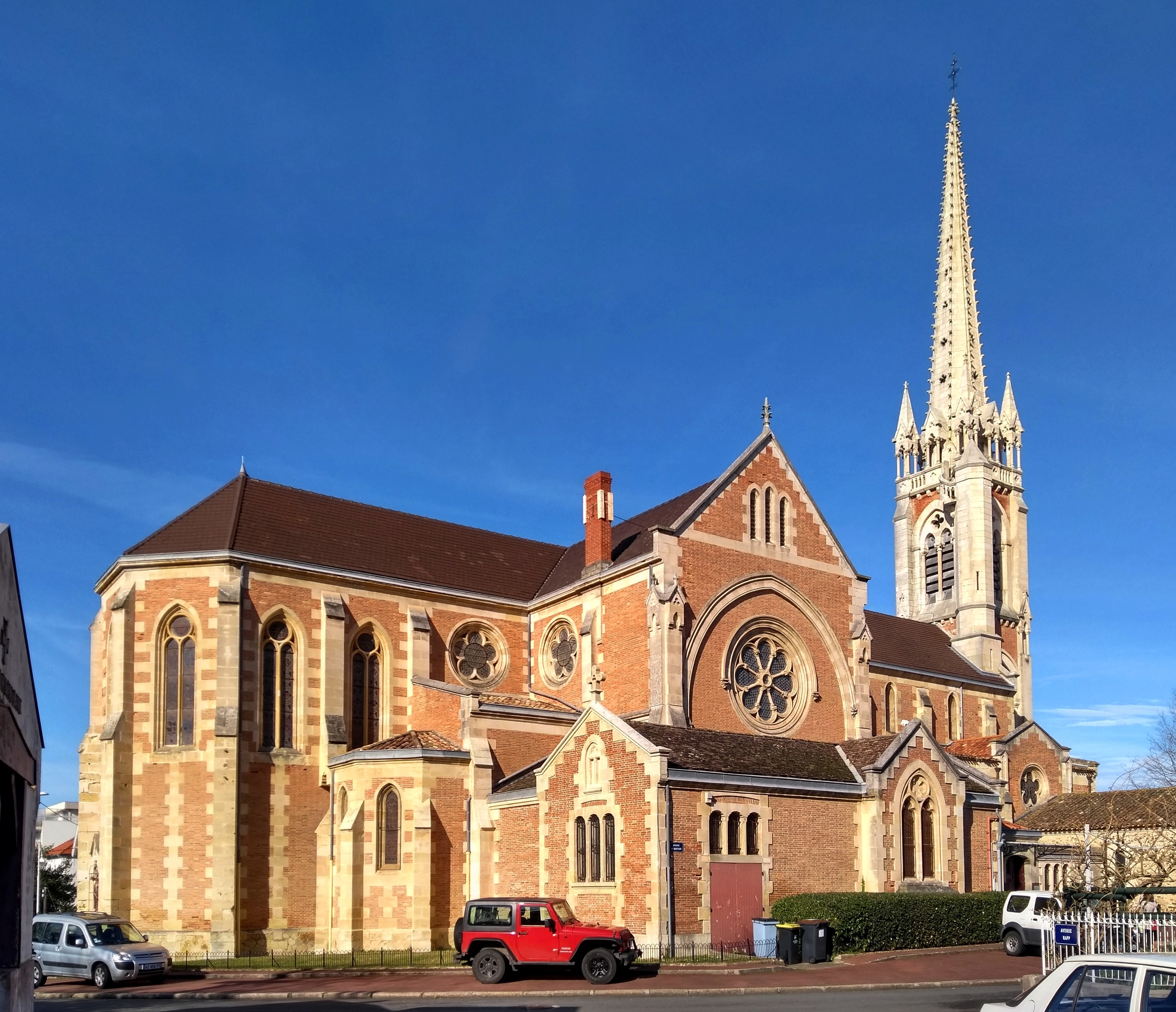 Basilique Notre-Dame d'Arcachon, 2020